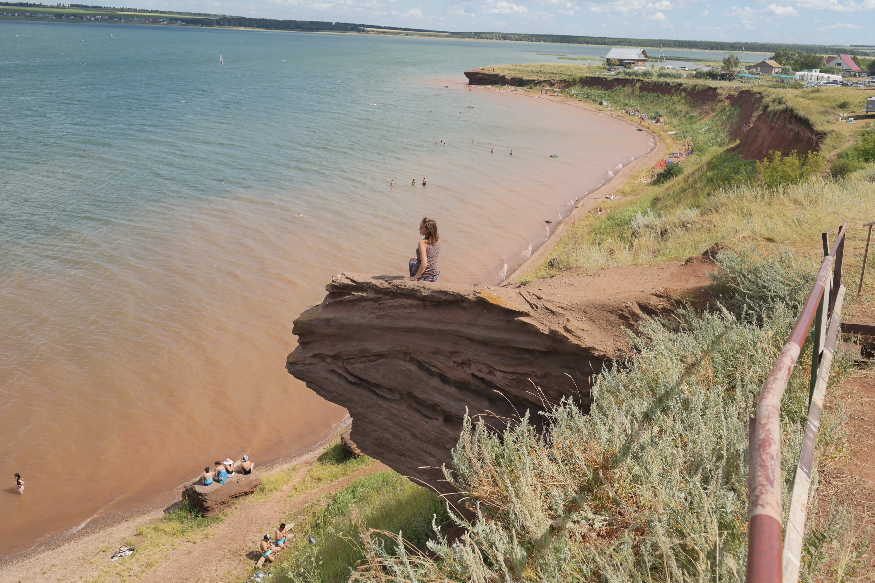 Аслы-Куль: Озеро Асылыкуль находится в 35 км от г. Давлеканово, территория самого парка - сельскохозяйственные земли Давлекановского, Альшеевского, Белебеевского и Буздякского районов, а также земли государственного лесного фонда, Давлекановский район, Башкортостан This image is related to the protected area of Russia number 0210115